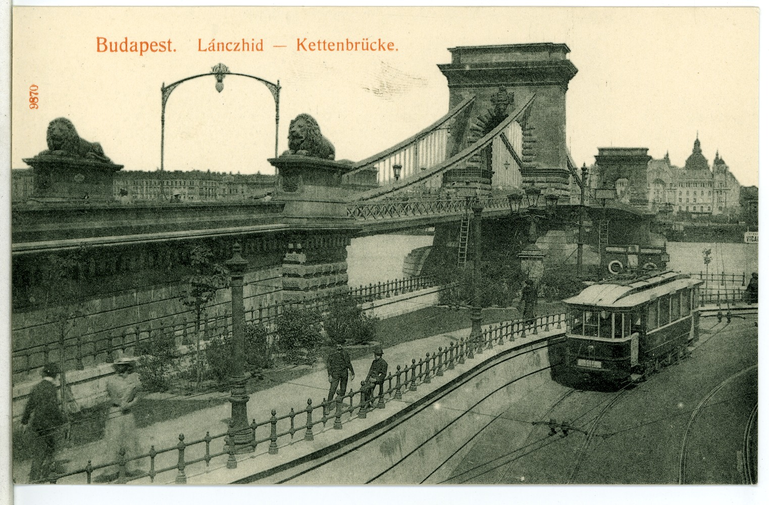 Budapest; Kettenbrücke mit Straßenbahn This postcard is from publisher Brück & Sohn in Meißen ( postcard has a unique number 09870 and is available in a higher resolution at the publisher. This images was uploaded in a cooperation project between Wikipedians and the publisher.